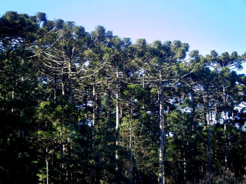 Reflorestamento de araucaria_angustifolia na Floresta Nacional de Caçador.